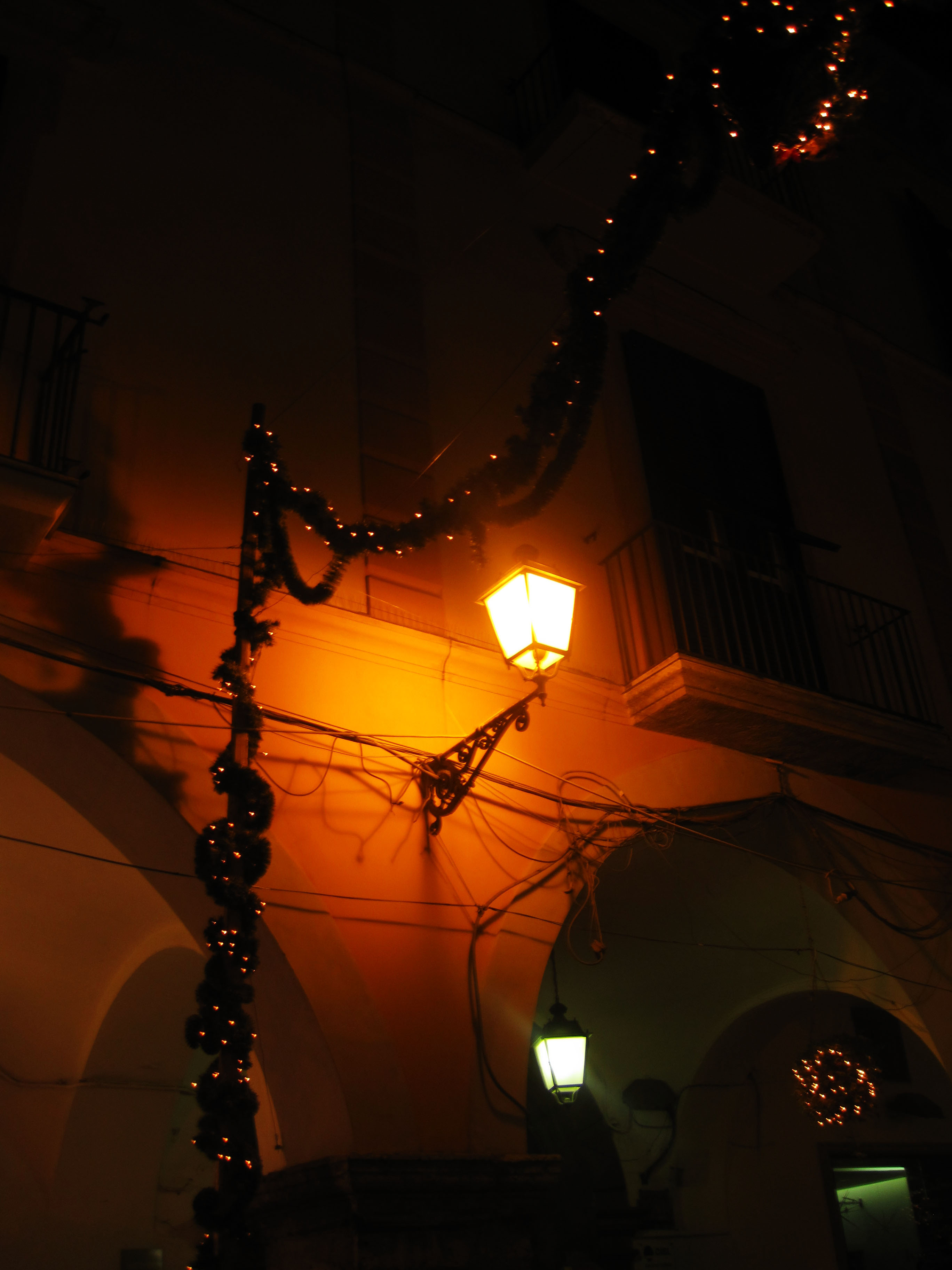 Foto scattata da me, in gita a Cava.